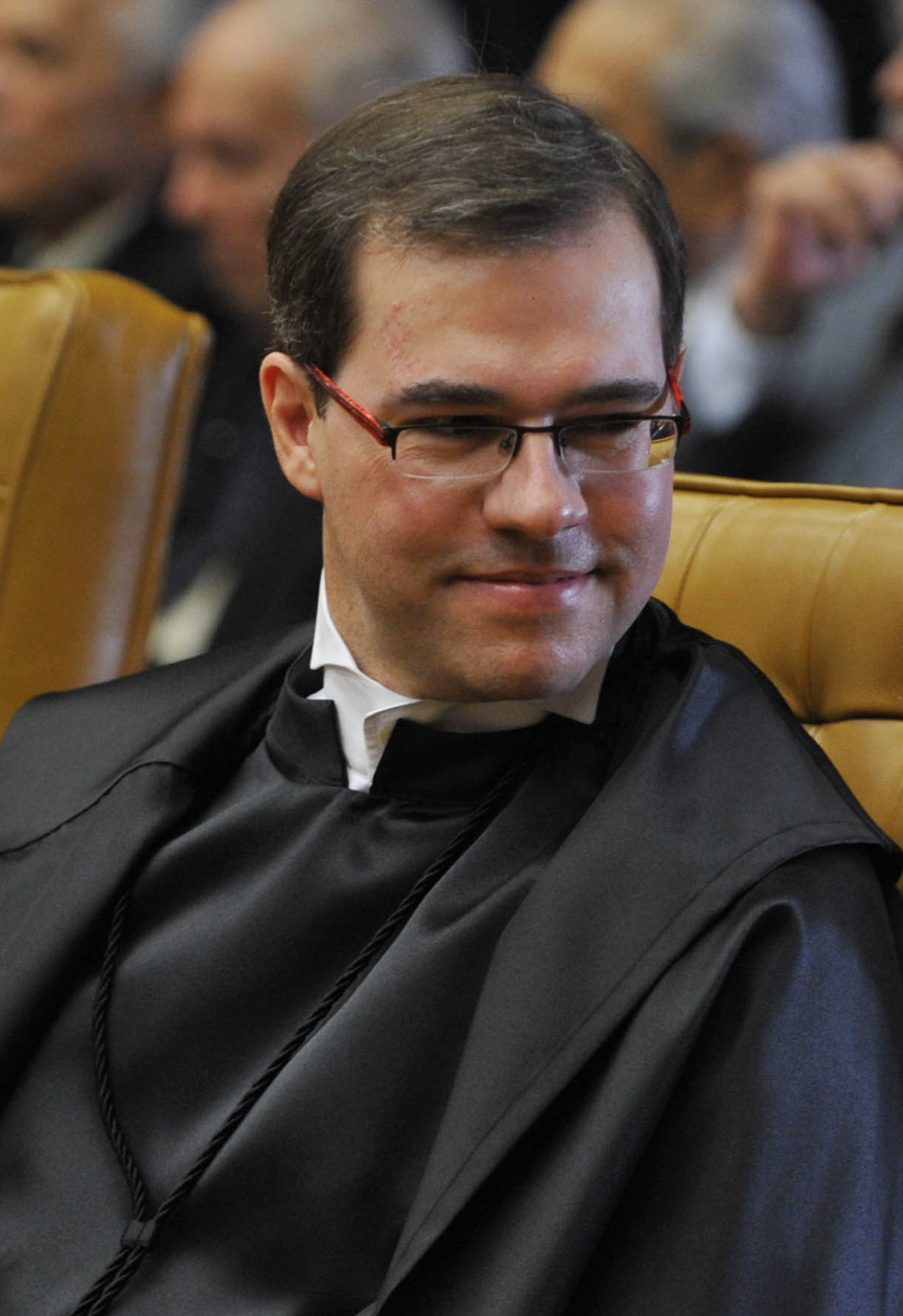 Posse do Ministro José Dias Toffoli no Supremo Tribunal Federal